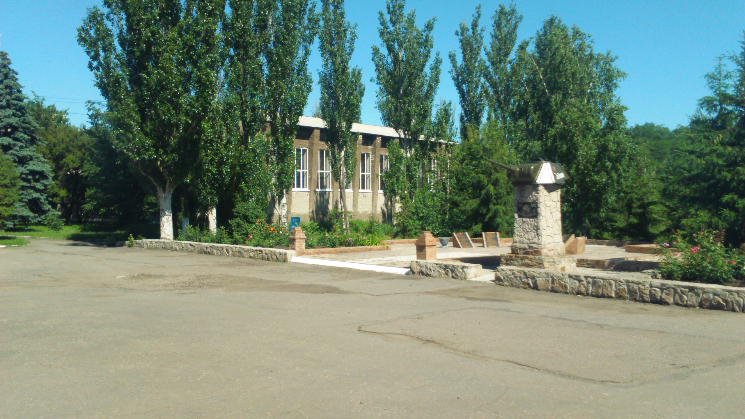 Світле — селище в Україні, Добропільському районі Донецької області, над річкою Водяна.